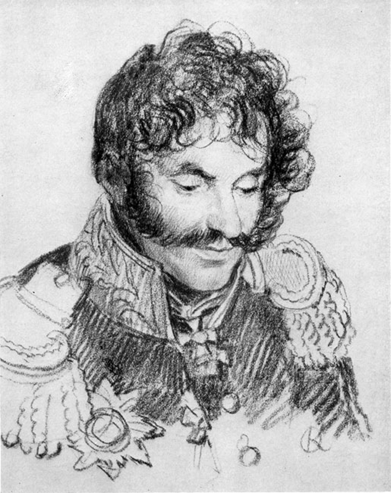 Чаплиц Ефим Игнатьевич